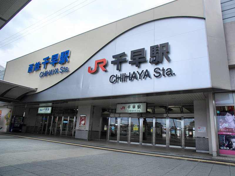 JR 鹿児島本線 千早駅 西日本鉄道 千早駅 西口の様子 遠景では両社の看板が良く分からないので近くからの撮影としました。 coor title dms|33|38|44.8|N|130|26|31.8|E *撮影者/著者/著作権保有者 : 利用者:MK Products|MK Products *撮影日 : 2008-01-16 * 千早駅 用にアップロードした画像です。良い画像があれば別の画像に変えてください。 GFDL|migration=relicense Category:九州旅客鉄道の鉄道駅画像 Category:西日本鉄道の画像 Category:鉄道駅画像 Category:福岡市の画像 Information |Description= Kyushu Railway Company And Nishi-nippon Railway Company Chihaya Station. West Gate. |Source=myself |Date=2008-01-16 |Author= 利用者:MK Products|MK Products |Permission=GFDL |other_versions=